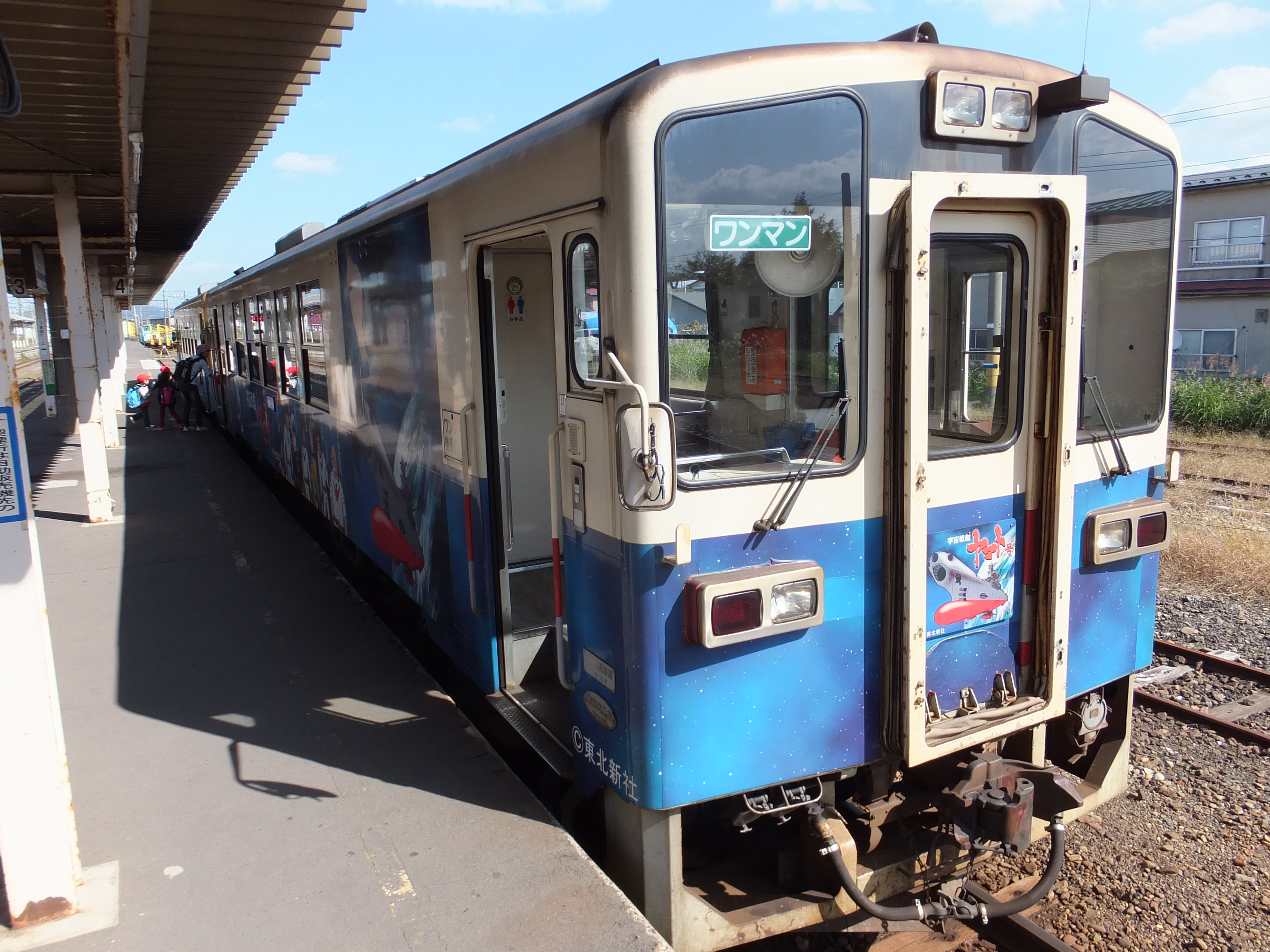 羽後本荘駅で発車を待つYR-2000形2001号。宇宙戦艦ヤマトのラッピング車両である。